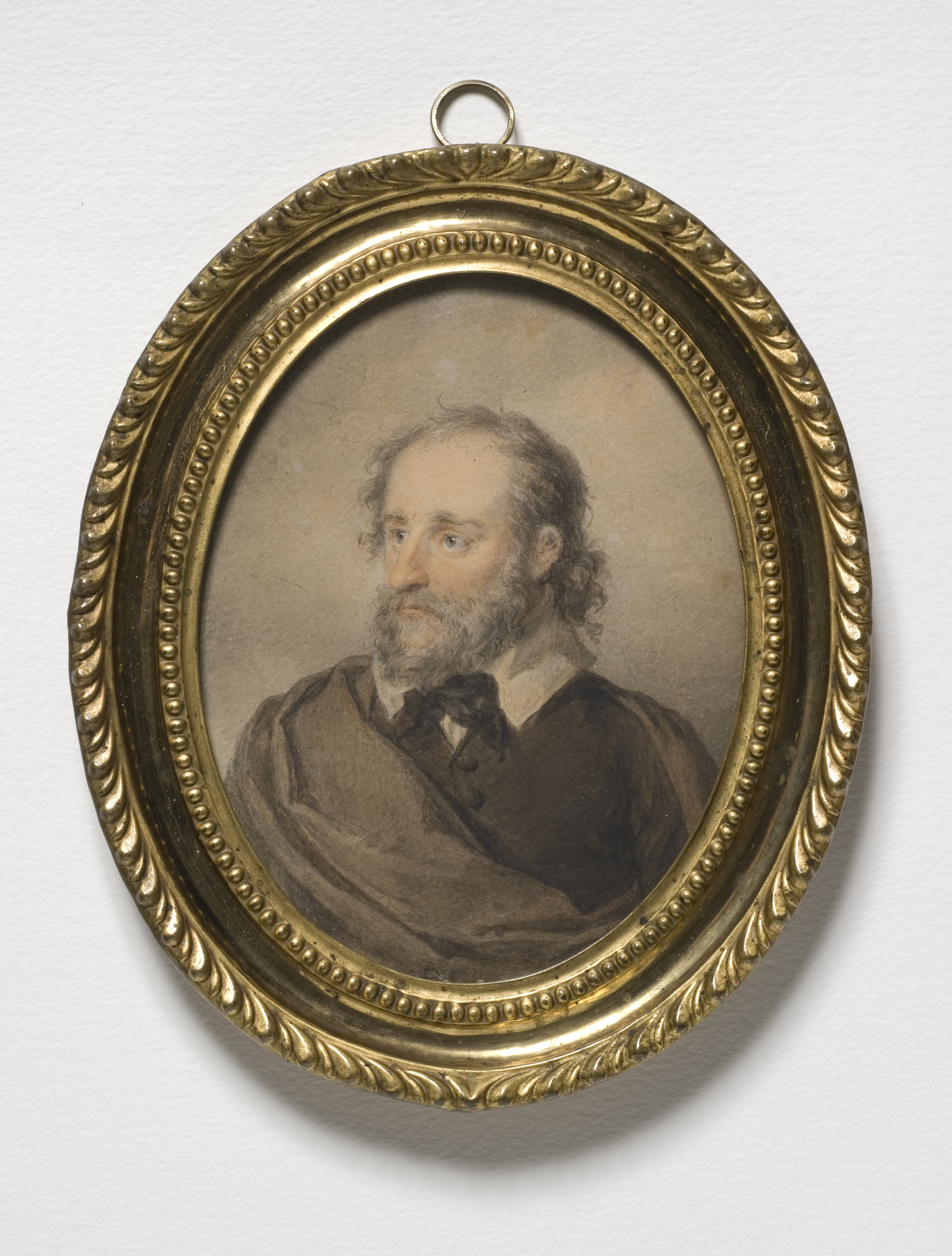 John Hall den yngre (1771-1830) miniatyrporträtt av Lorentz Svensson Sparrgren. Mått 13 cm; Tuschlavyr med färg på papp.Oval. Ram av metall och trä.